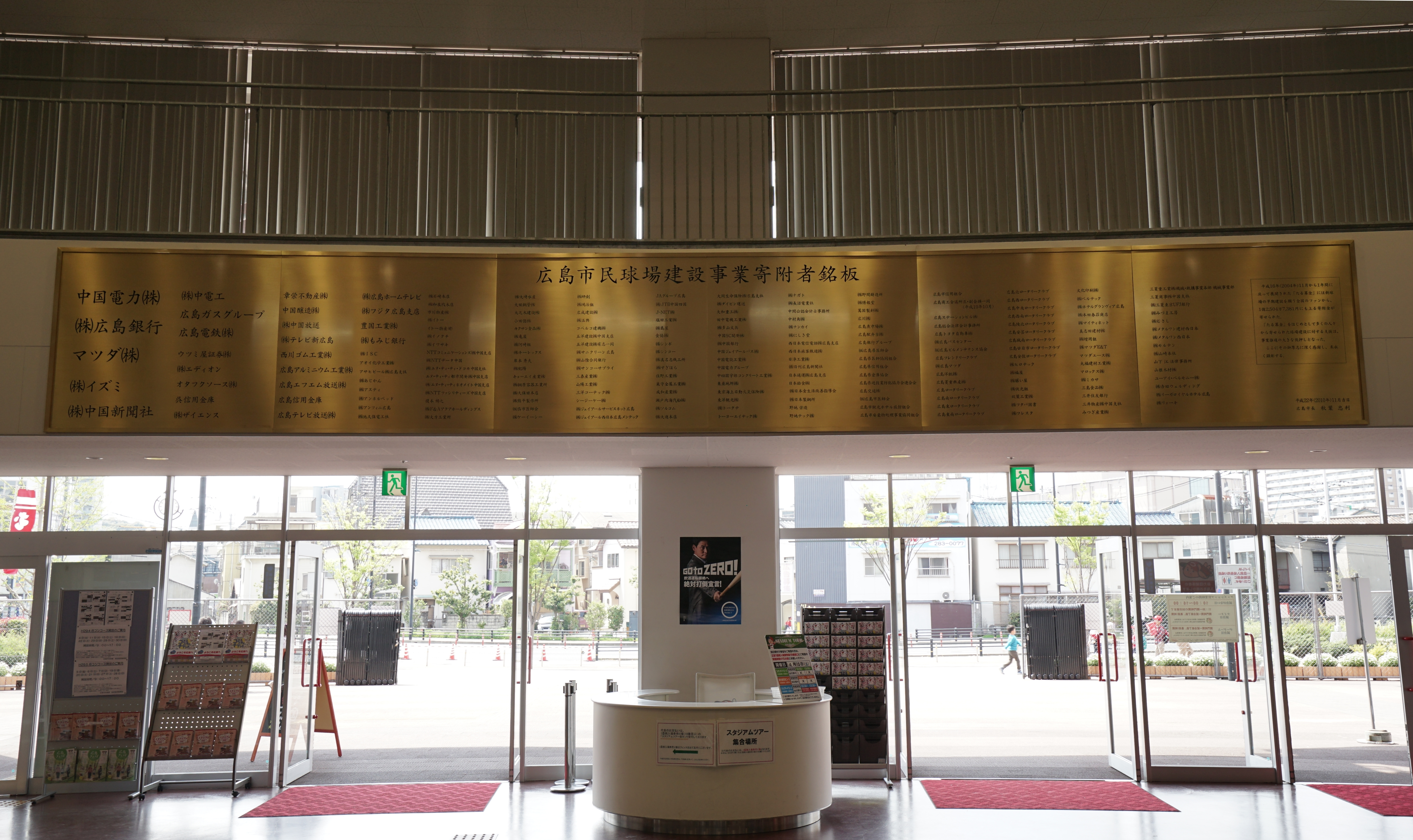 マツダスタジアム 正面入口付近にて本人撮影